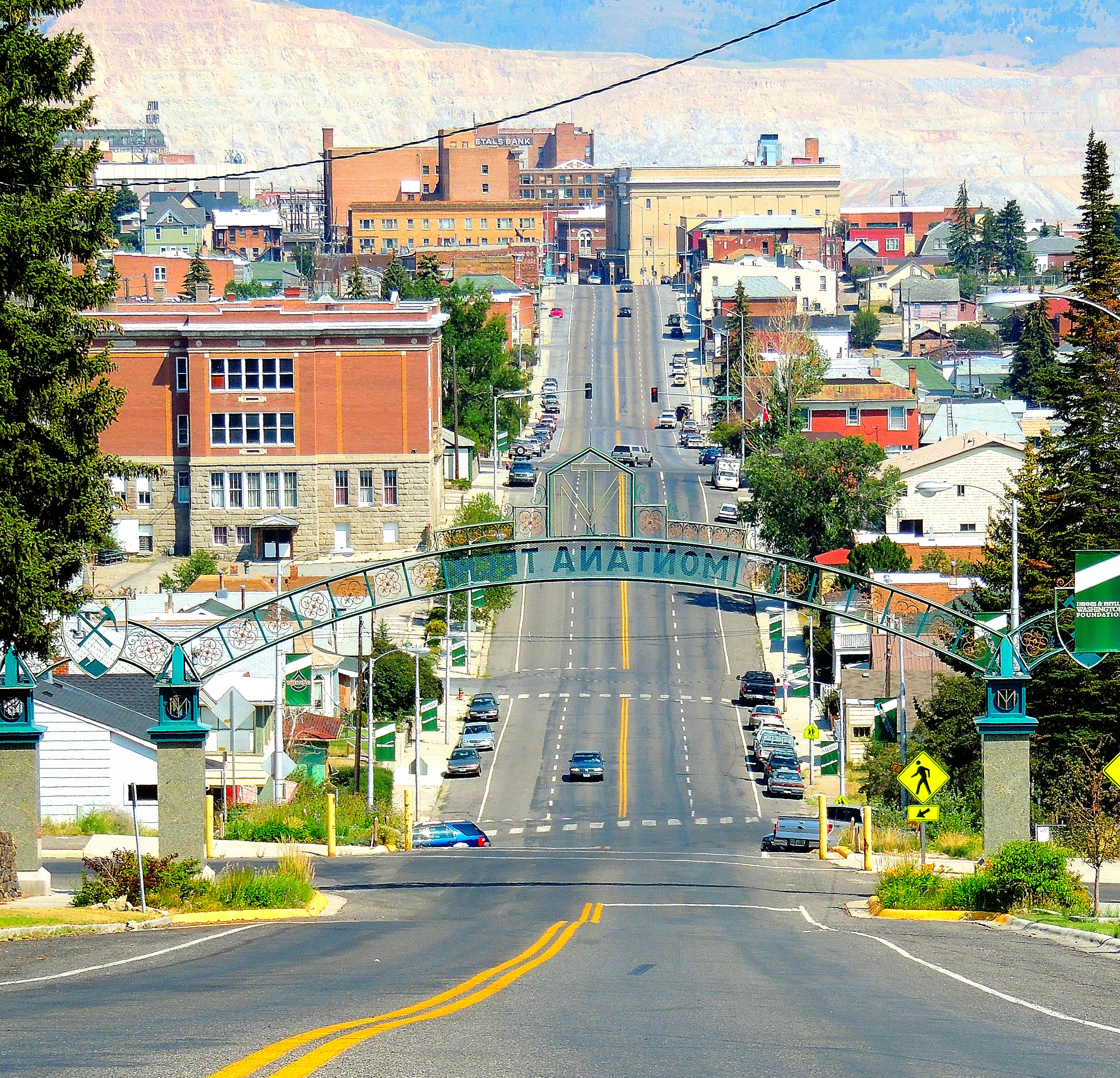 Butte, Montana